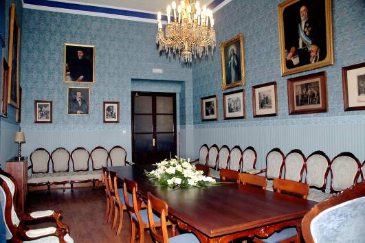 Sala de profesores- Museo Aguilar y Eslava